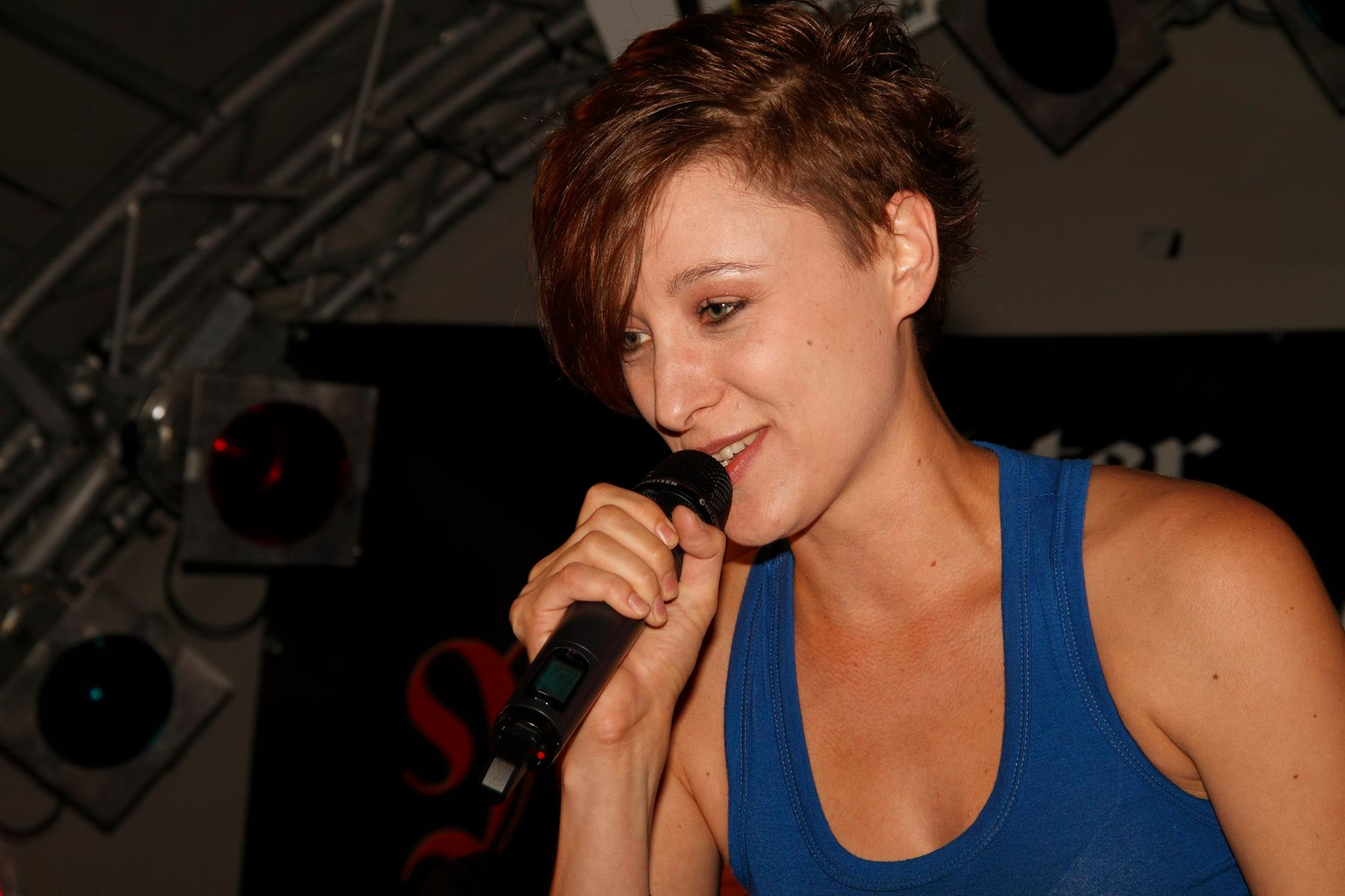 Annie Heger auf dem Stadtfest in Oldenburg 2012